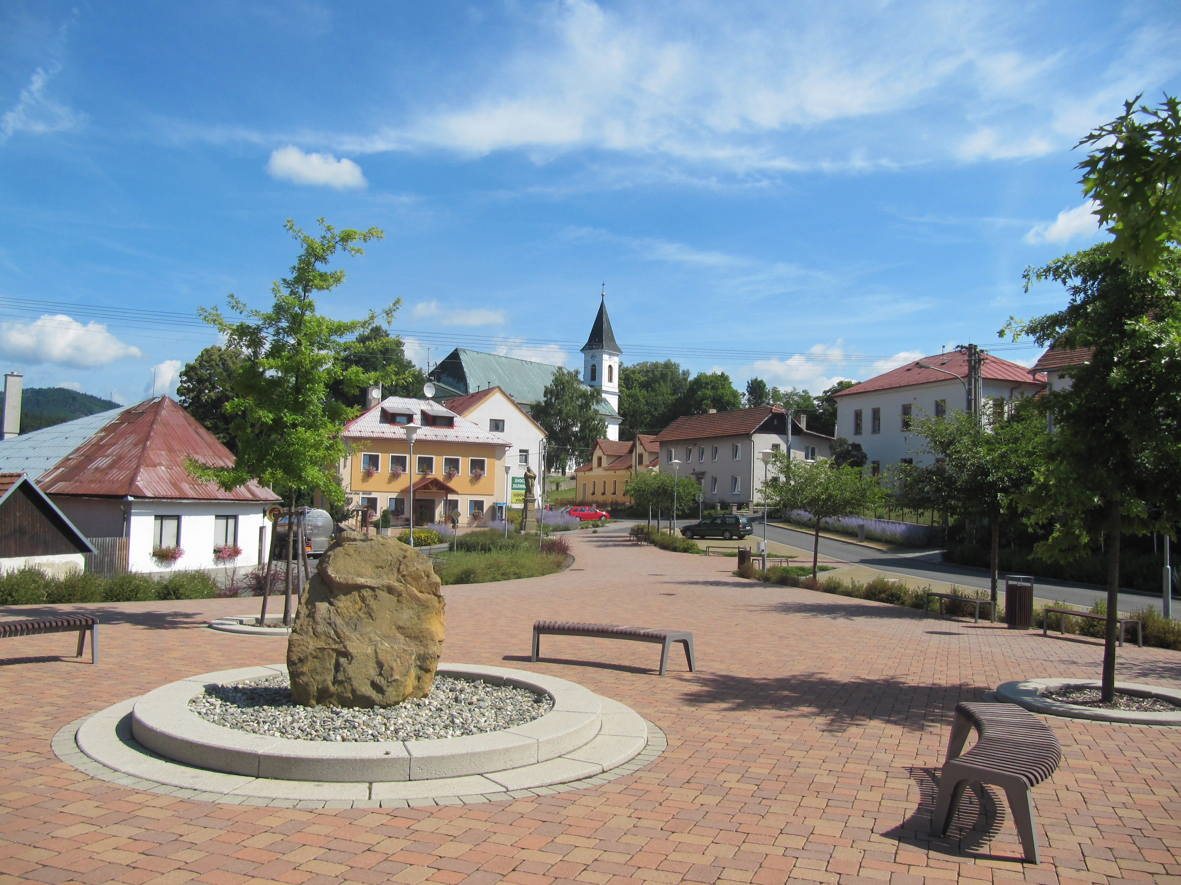 Újezd, okres Zlín, Česká republika.